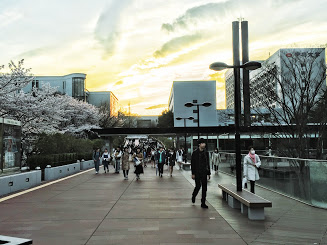 白門プロムナードの様子